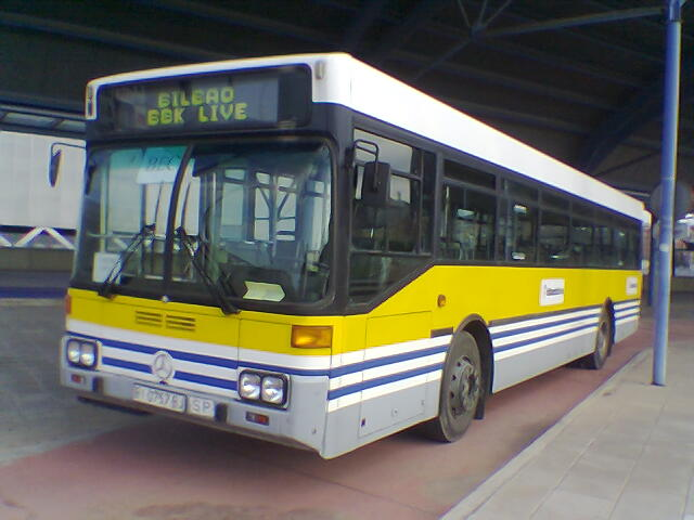 Bizkaibus Mercedes-Benz O 405